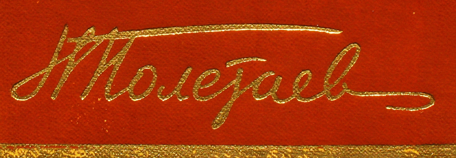 Soviet poet Nikolai Poletaev (dead in 1935) signature in his book.